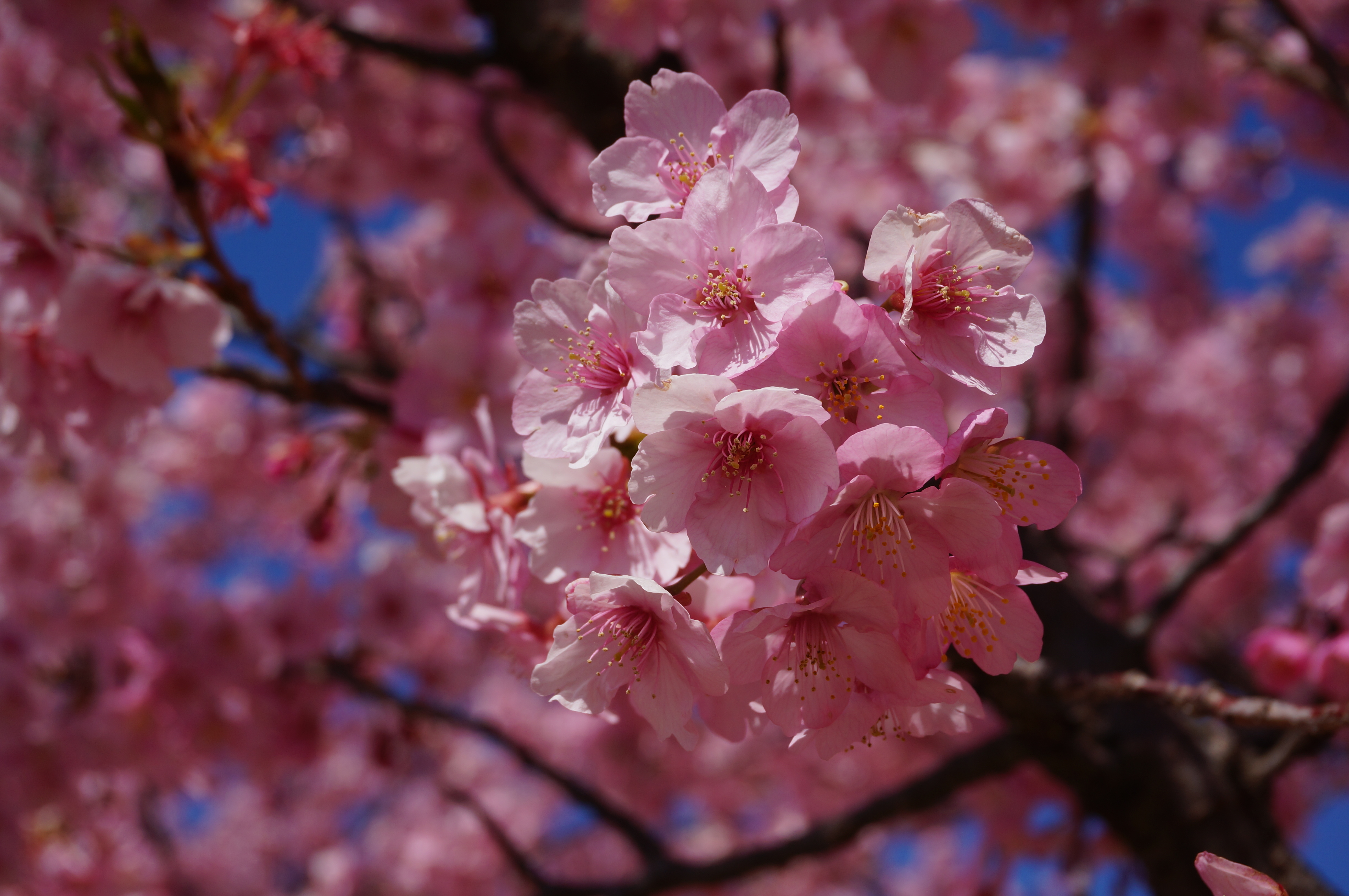 カワヅザクラの花弁